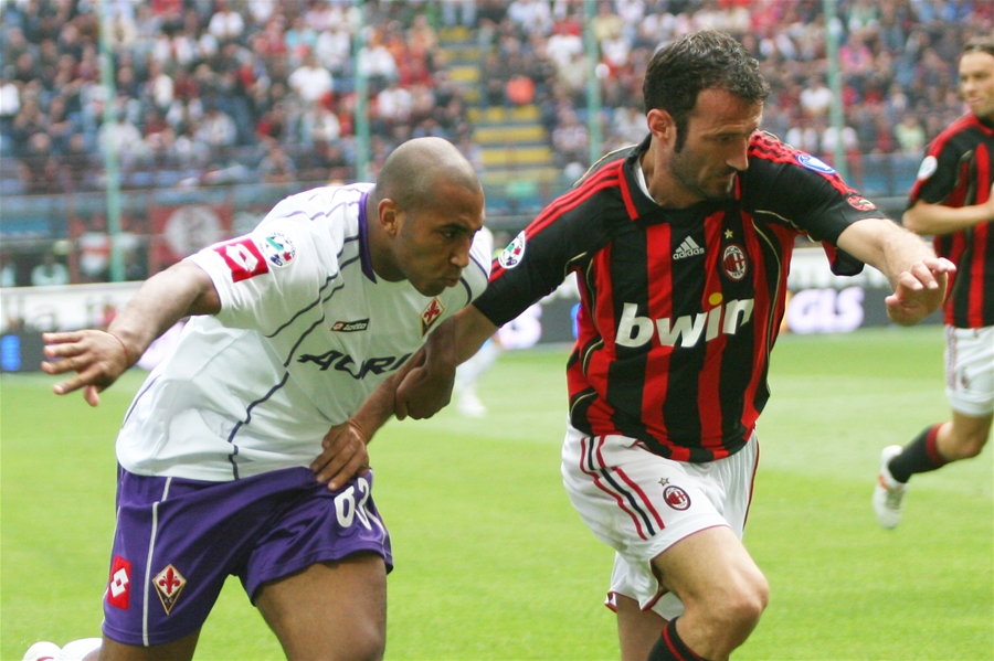 Reginaldo Ferreira da Silva and Giuseppe Favalli